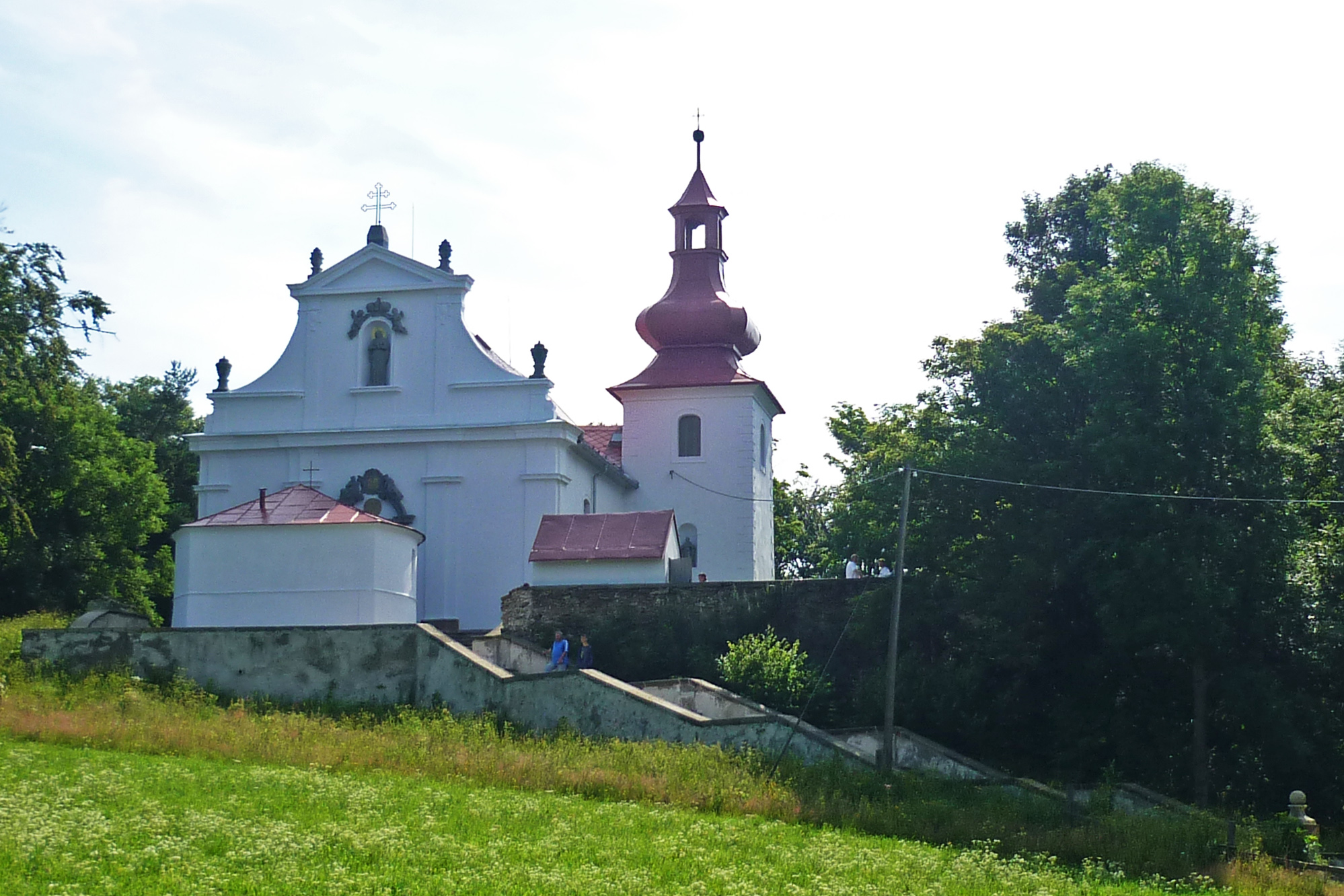 Wallfahrtskirche Quinau (Květnov) bei Komotau (Chomutov)